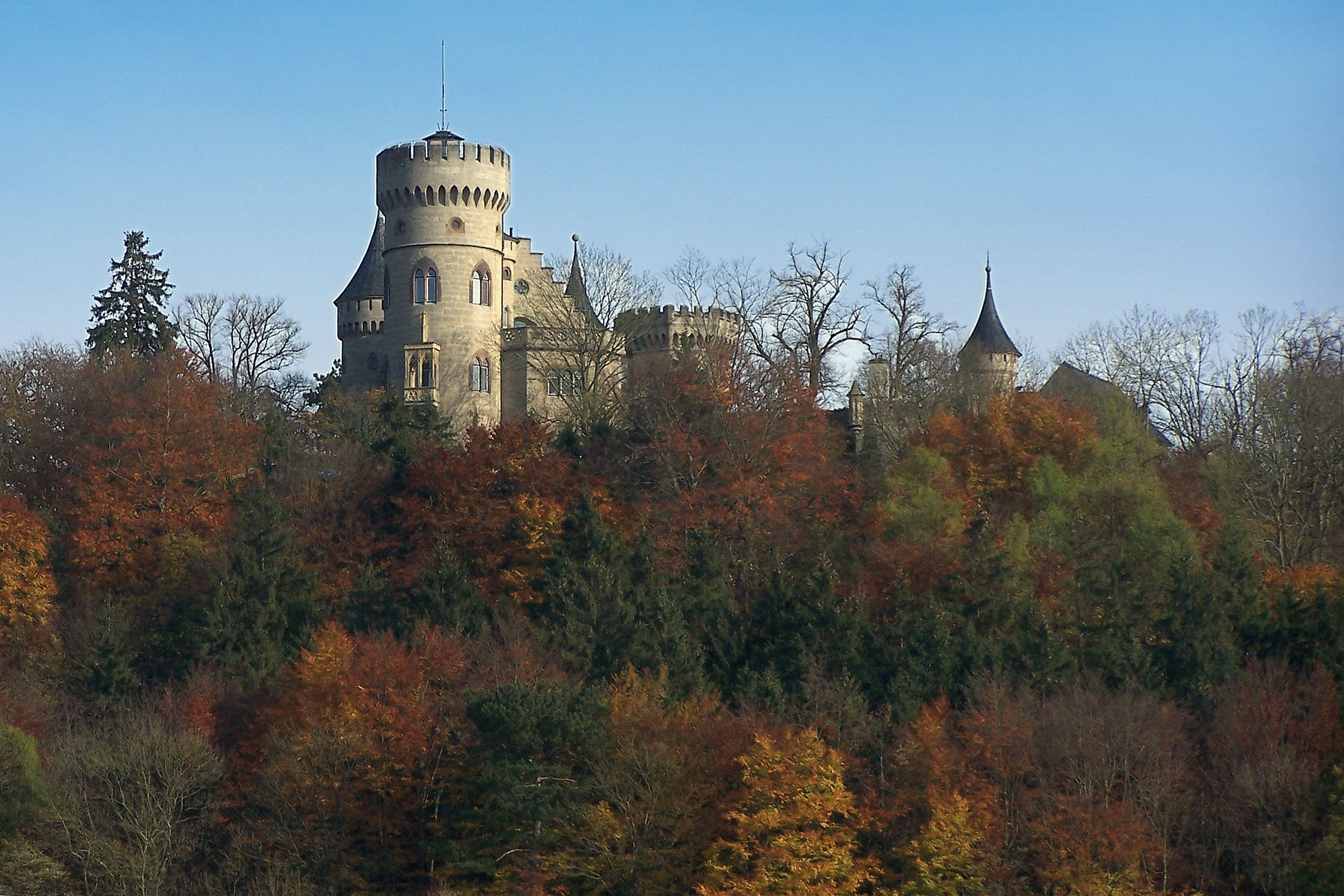 Schloß Landsberg von Westen im Herbst 2007